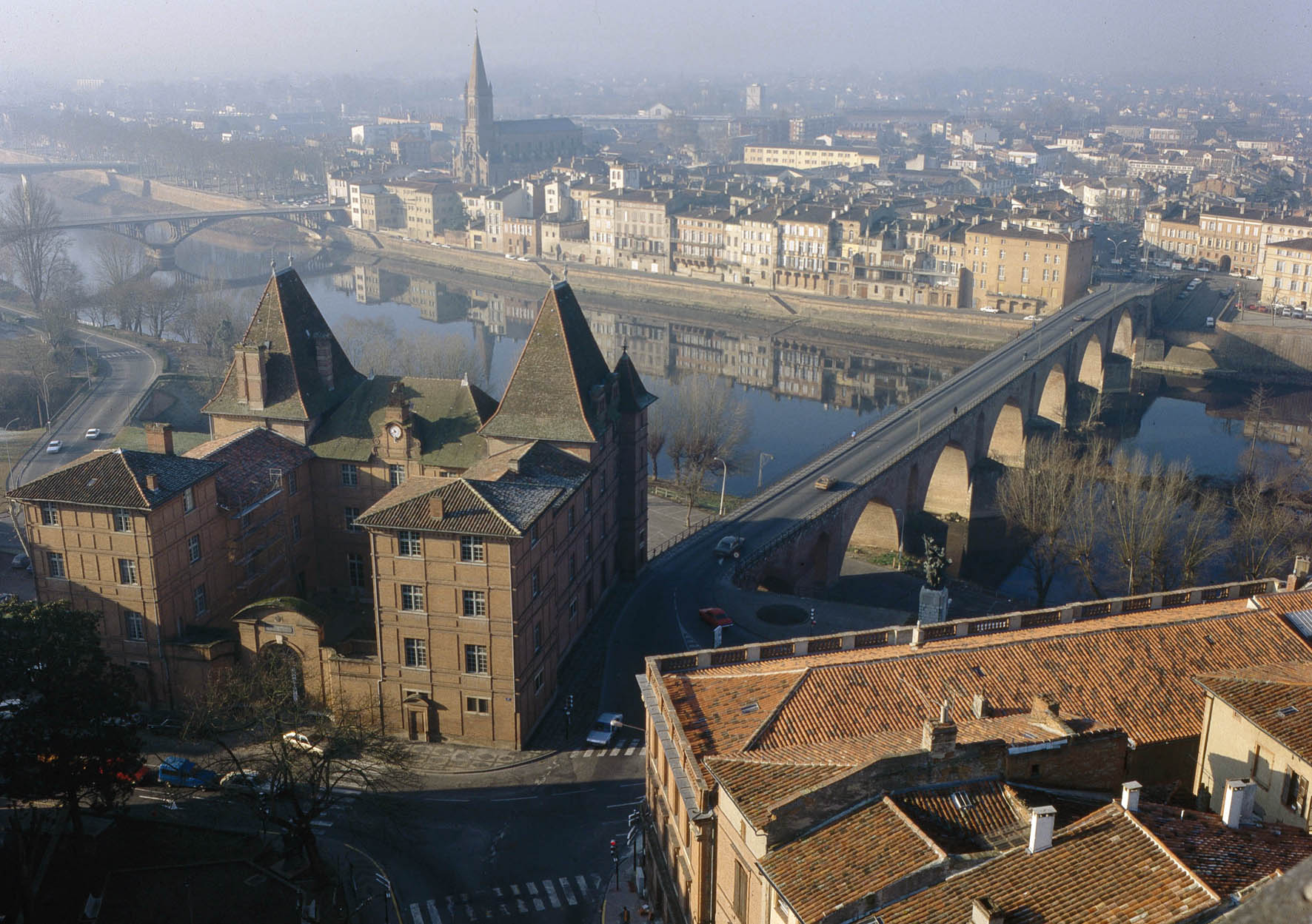 Palais épiscopalMusée Ingres